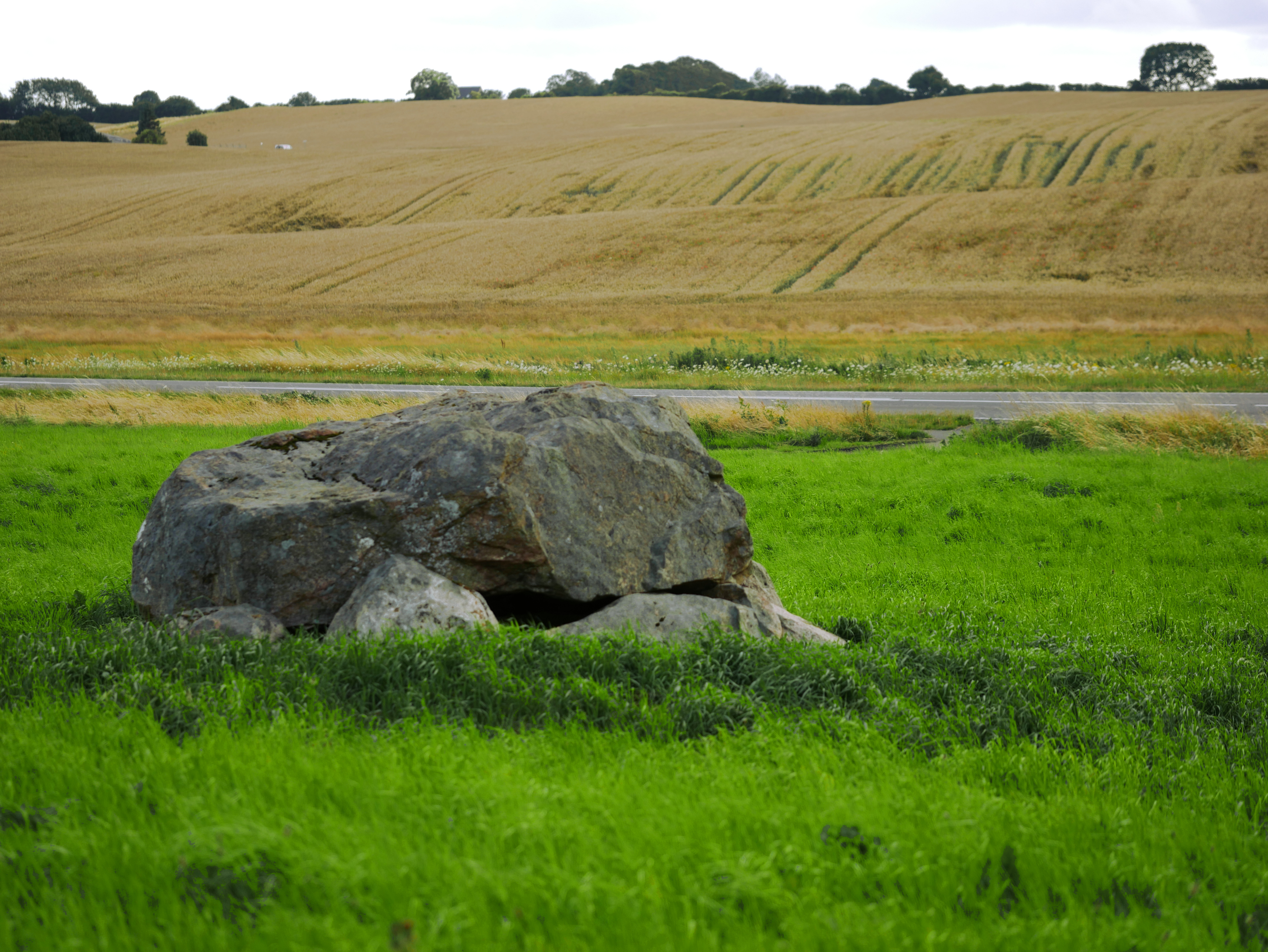 Runddysse von Strårup (auch Straarup genannt) liegt im Weiler Dalby in der Hedensted Kommune, bei Kolding in der Region Syddanmark, in Jütland in Dänemark. Der Dolmen stammt aus der Jungsteinzeit etwa 3500–2800 v. Chr. und ist eine Megalithanlage der Trichterbecherkultur (TBK).